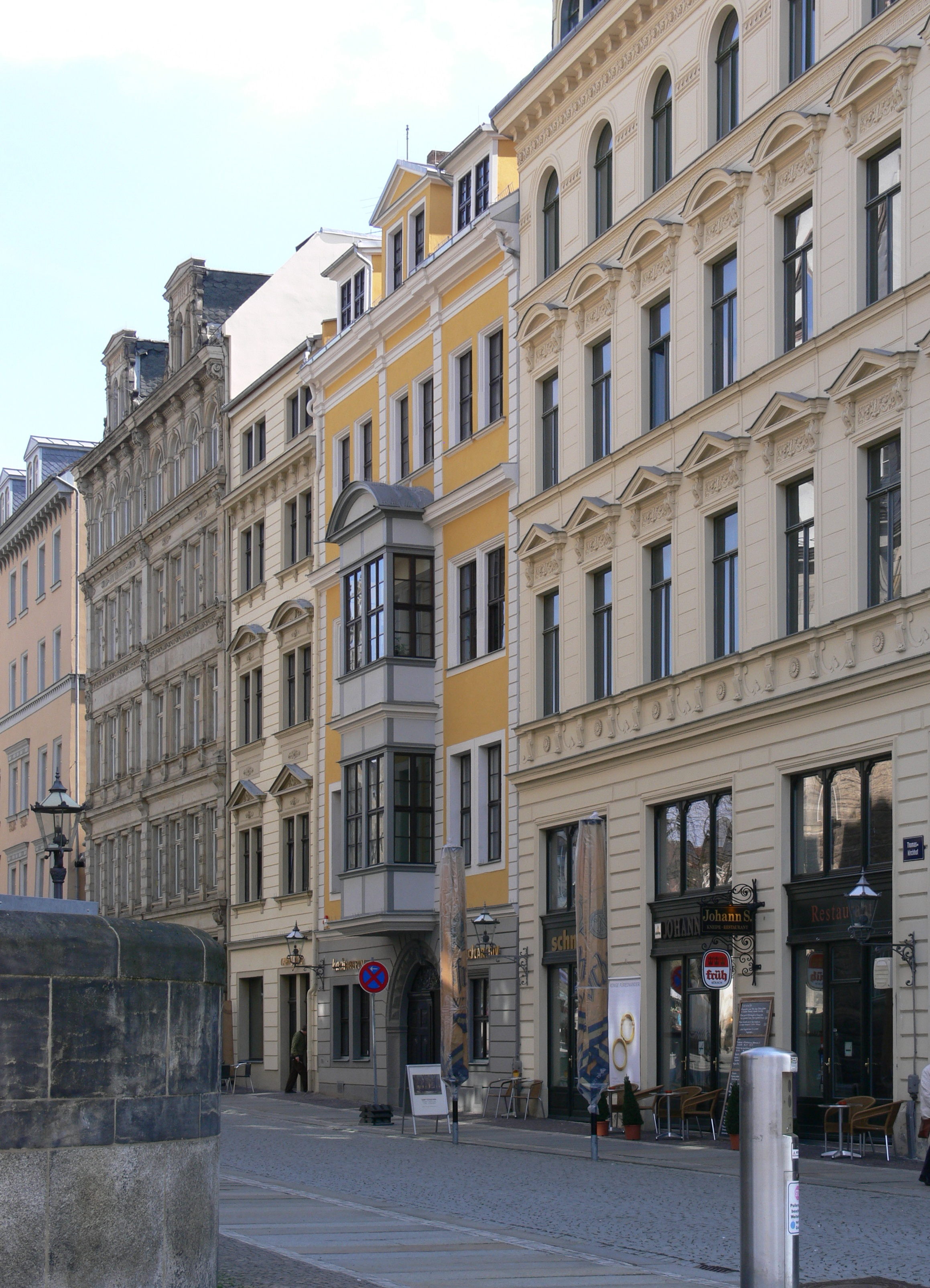 Leipzig, Bach-Museum und Bach-Archiv